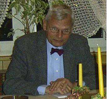 Hinnerk Fock am 18. Oktober 2007 auf einer Veranstaltung der FDP in Fuhlsbüttel.